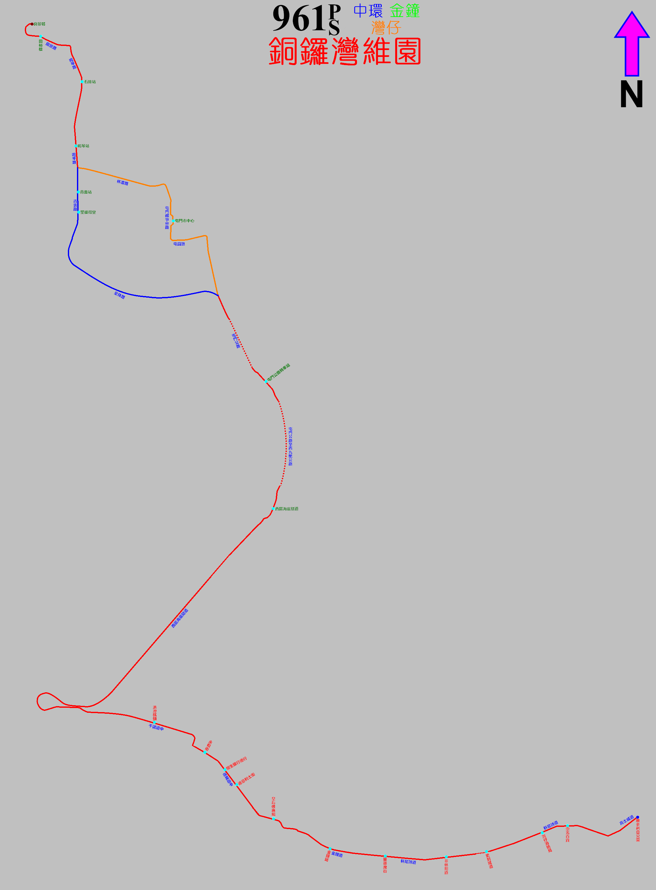 中文（香港）: 過海隧巴961P線的走線圖